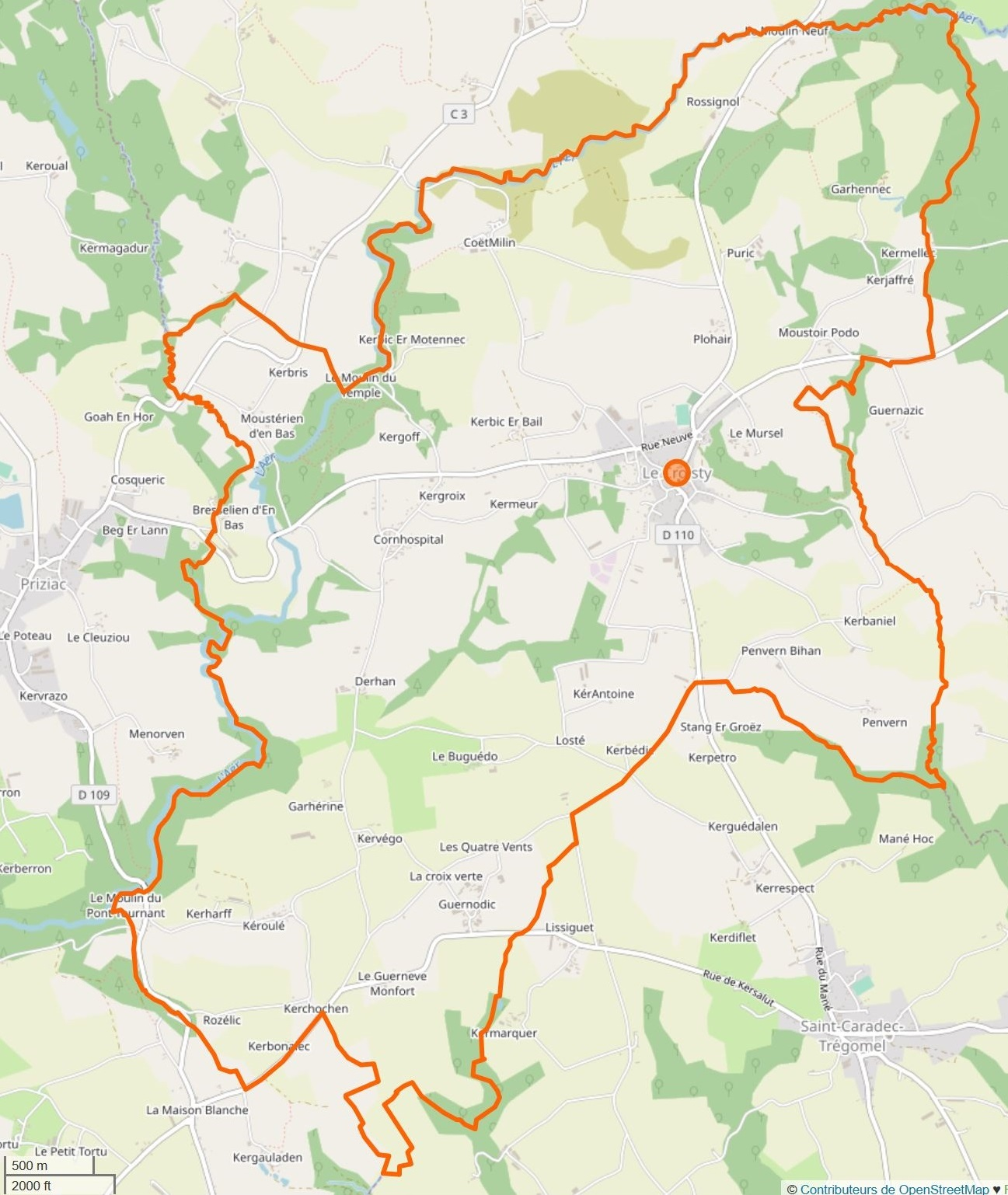 Cette carte a été créée à partir des données du projet openstreetmap. This map may be incomplete, and may contain errors. Don't rely solely on it for navigation.